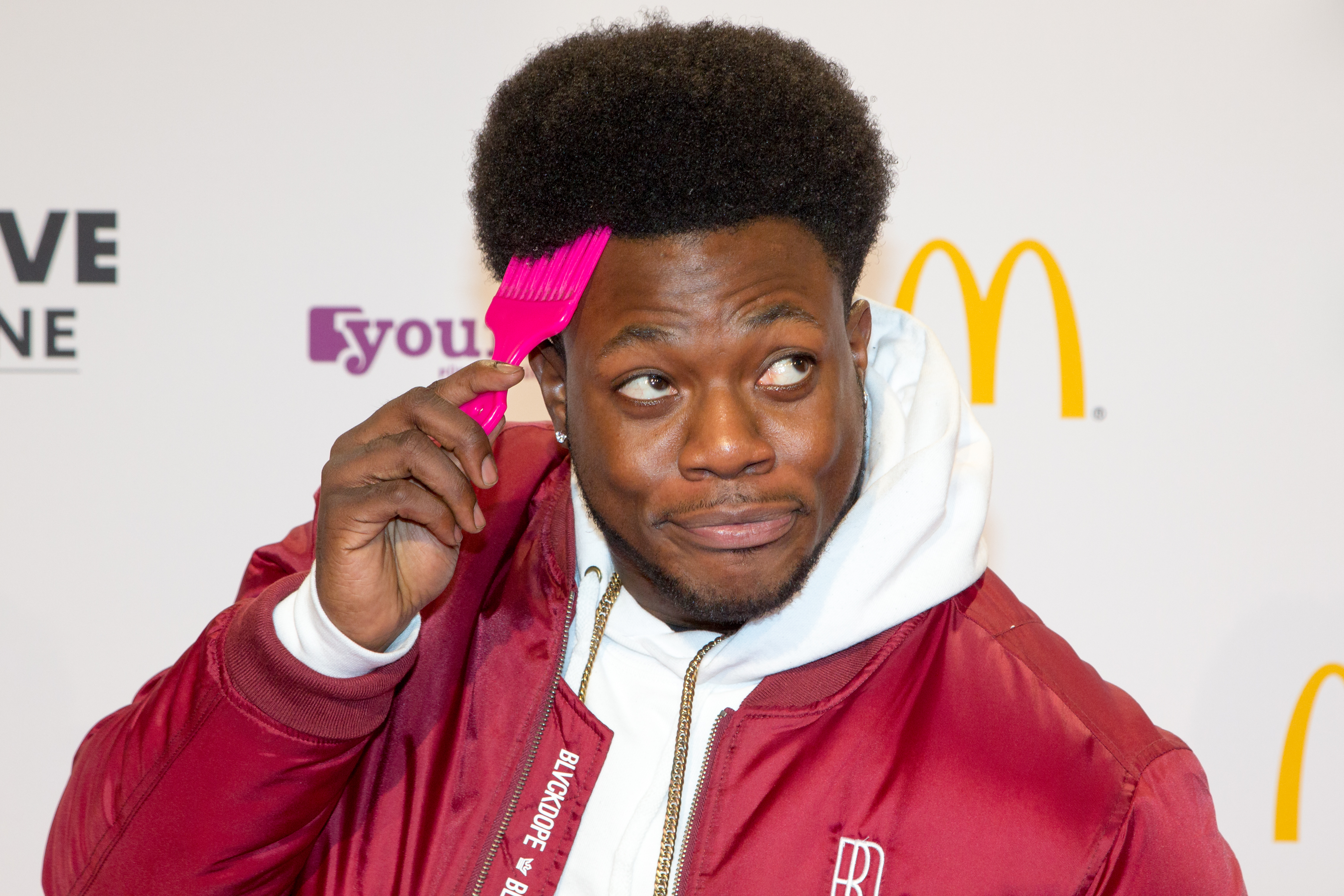 1LIVE Krone 2015 - Jokah Tululu